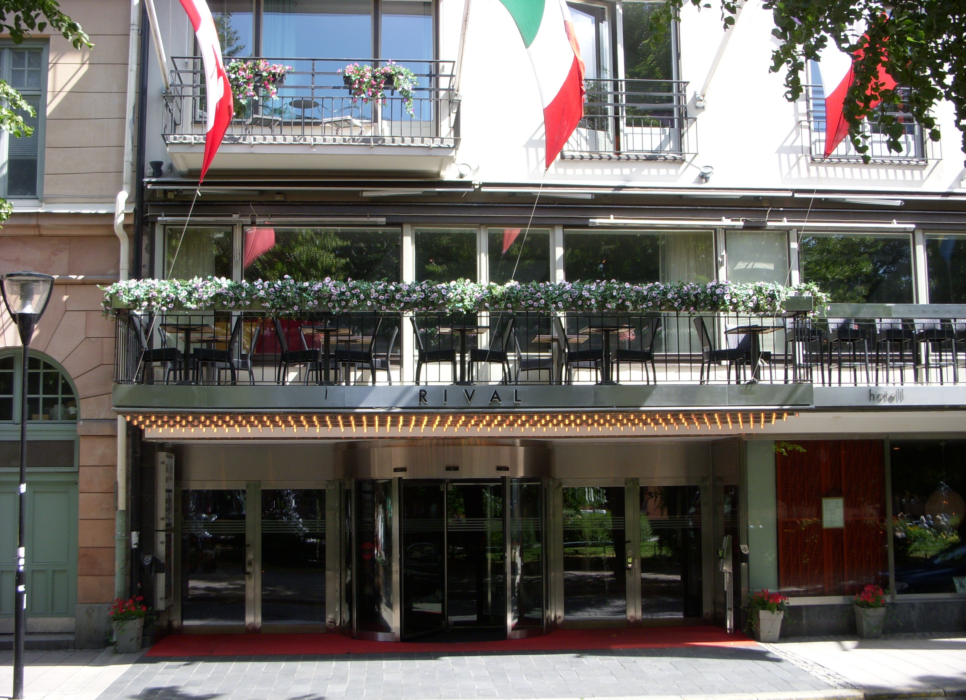 Hotell Rival, Mariatorget, Södermalm, Stockholm